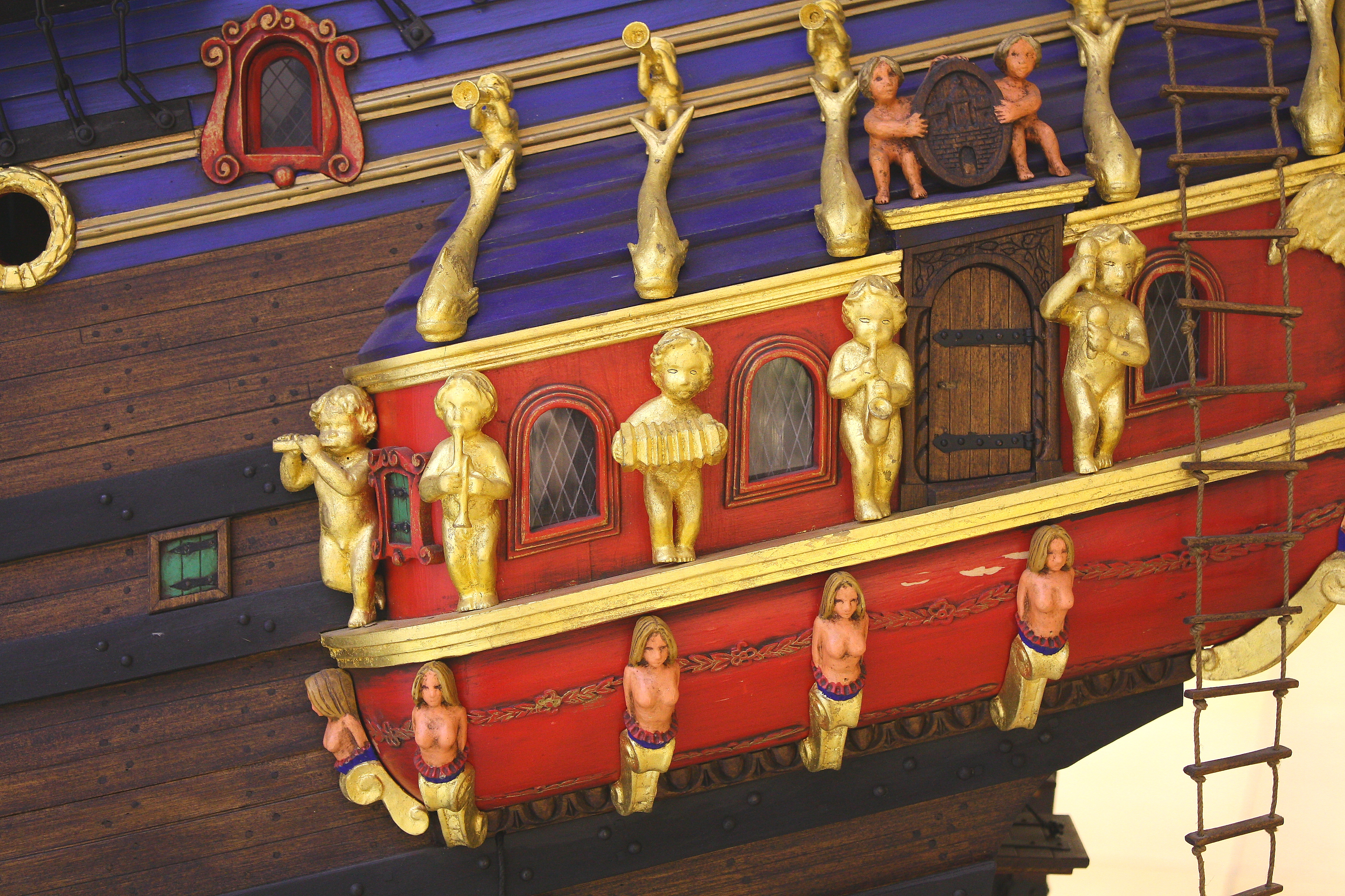 Modell des hamburgischen Konvoyschiffes Wapen von Hamburg (II) - Blick auf die Seitengalerie (Backbord)